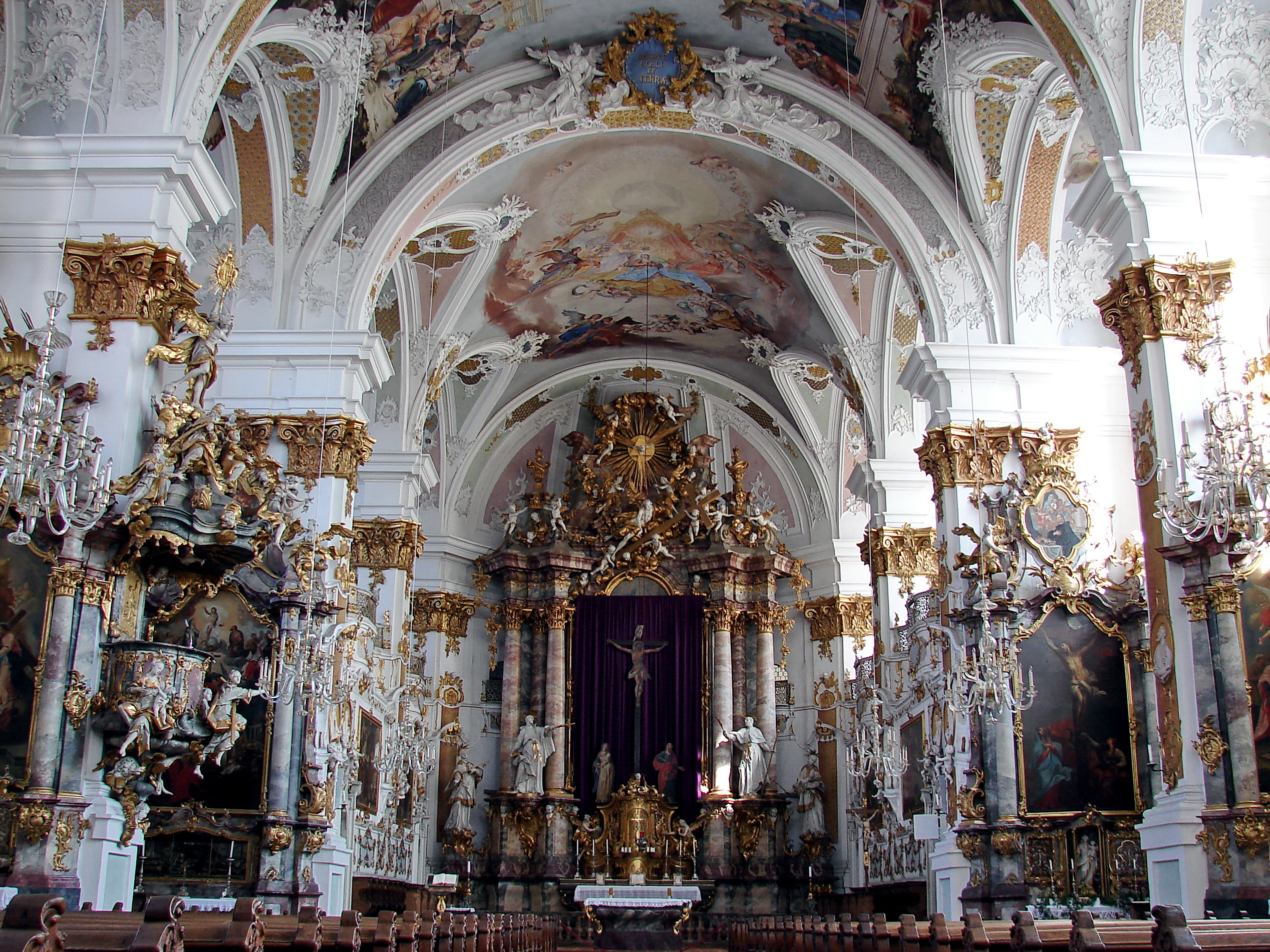 Die Studienkirche Mariä Himmelfahrt wurde zu Beginn des 17. Jahrhunderts als Universitätskirche des Collegiums St. Hieronymi, des ehemaligen Jesuitenkollegs in Dillingen an der Donau im Regierungsbezirk Schwaben (Bayern), errichtet. In der Mitte des 18. Jahrhunderts wurde die Kirche im Stil des Rokoko neu gestaltet.